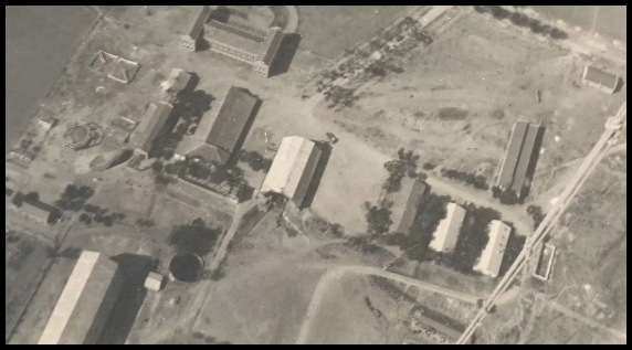 Parque de Aerostación de los Ingenieros Militares previo al barrio de Los Manantiales